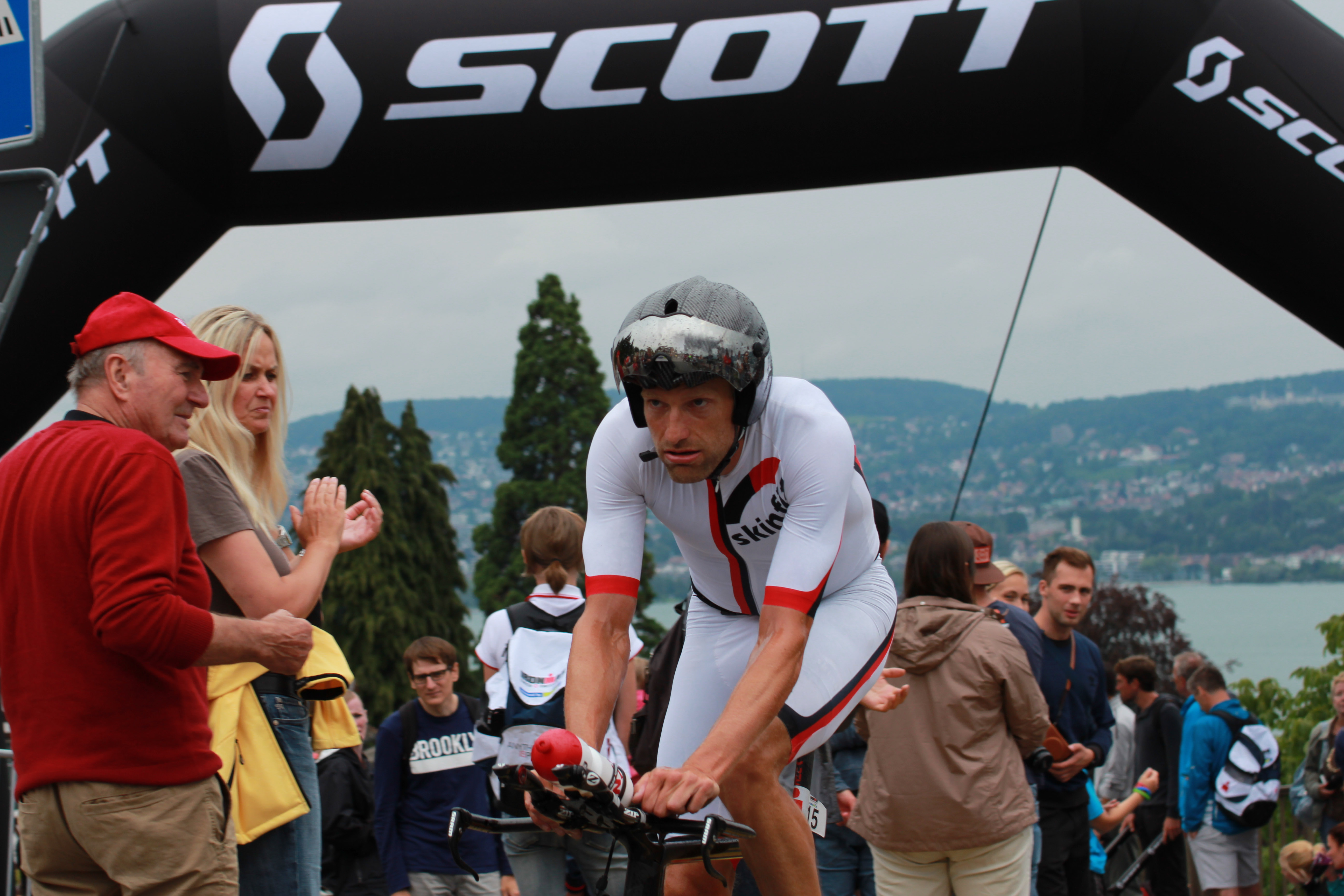 Reto Stutz beim Ironman Switzerland 2014.jpg